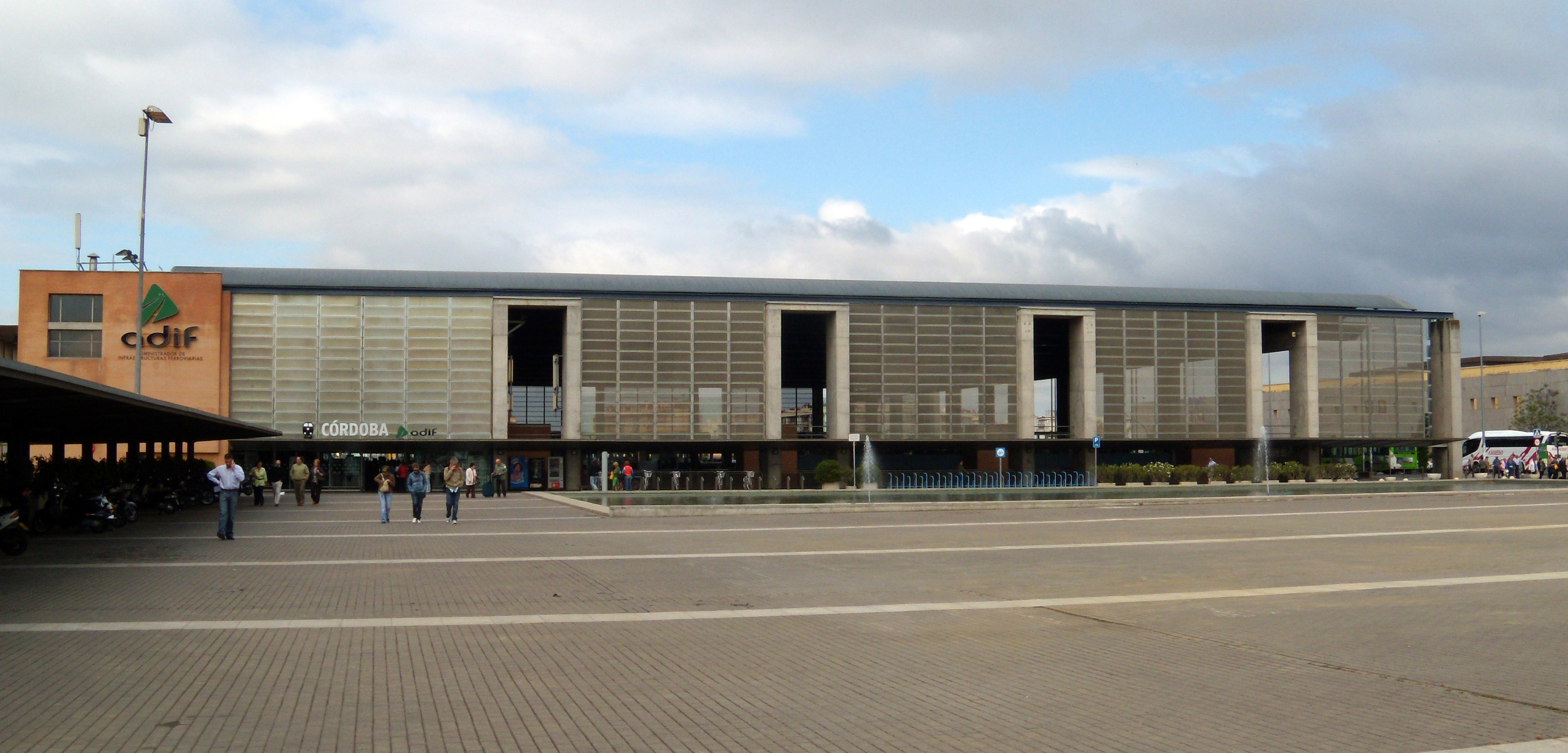 Córdoba Central, la gare ferroviaire de Cordoue (Espagne)